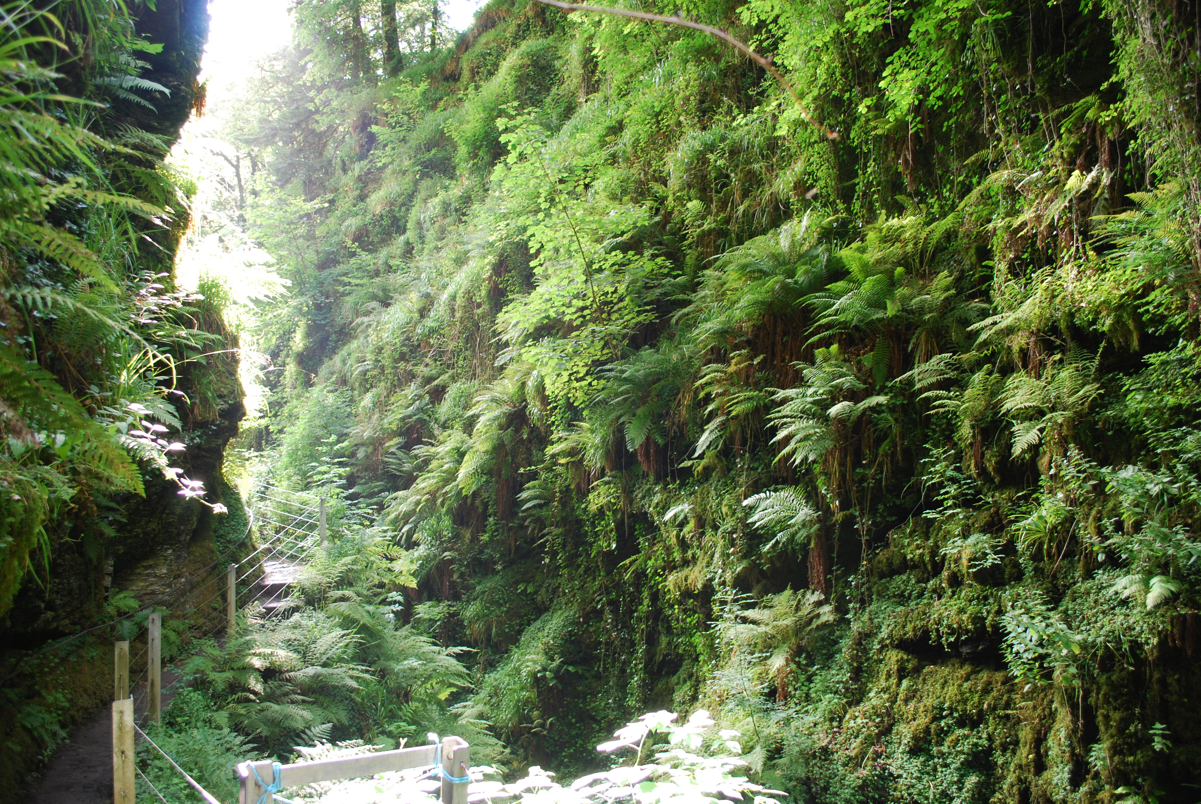 Lydford Gorge